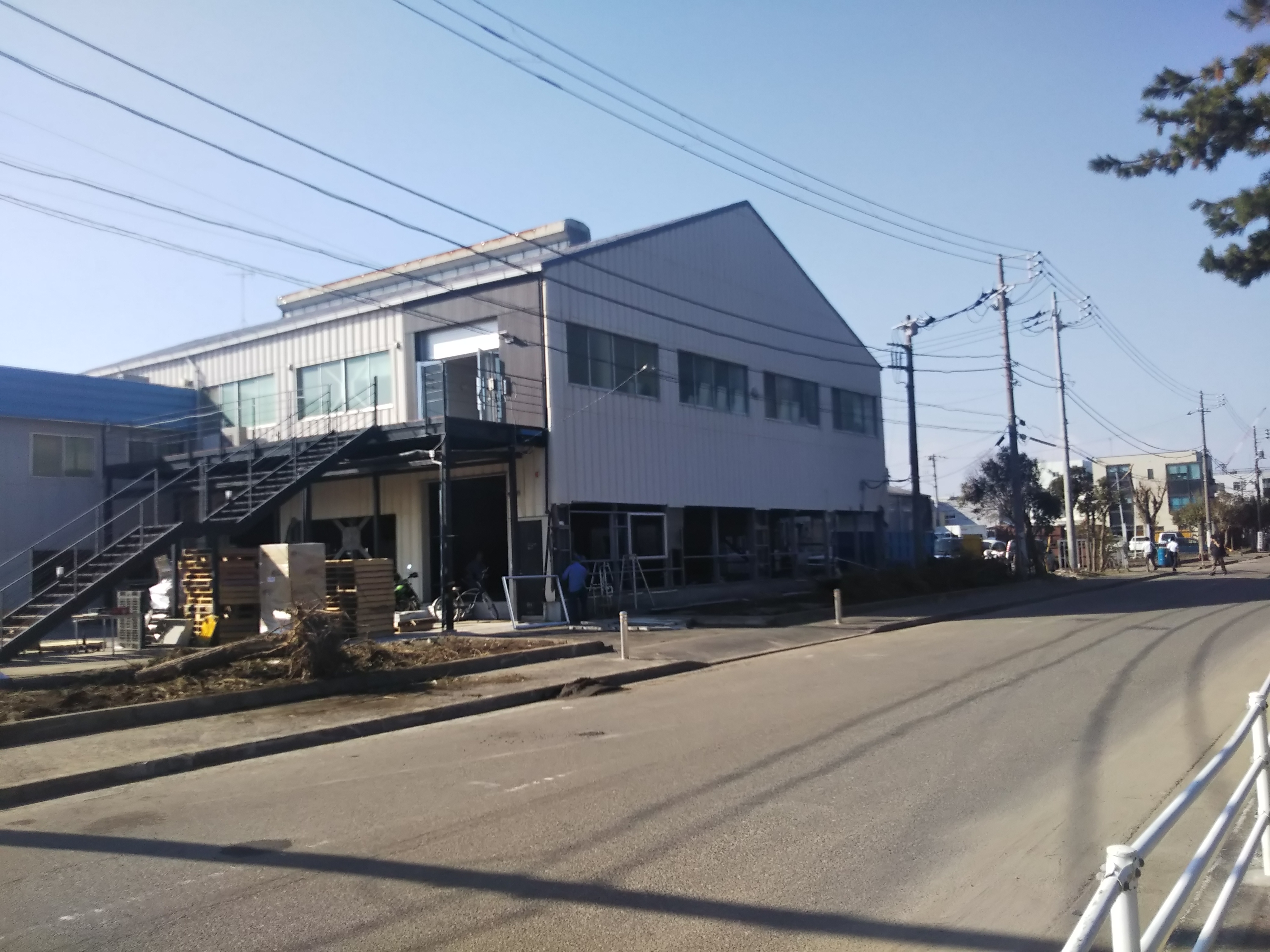 令和元年台風第15号で損壊した、横浜市金沢区の工場